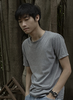 ศรัทธา แสงทอน